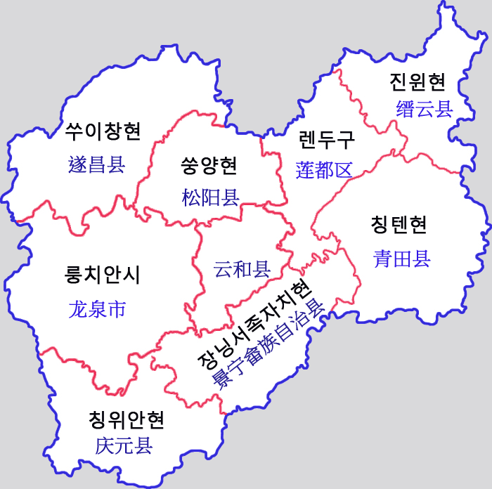 절강성 리수이시 현급구역도